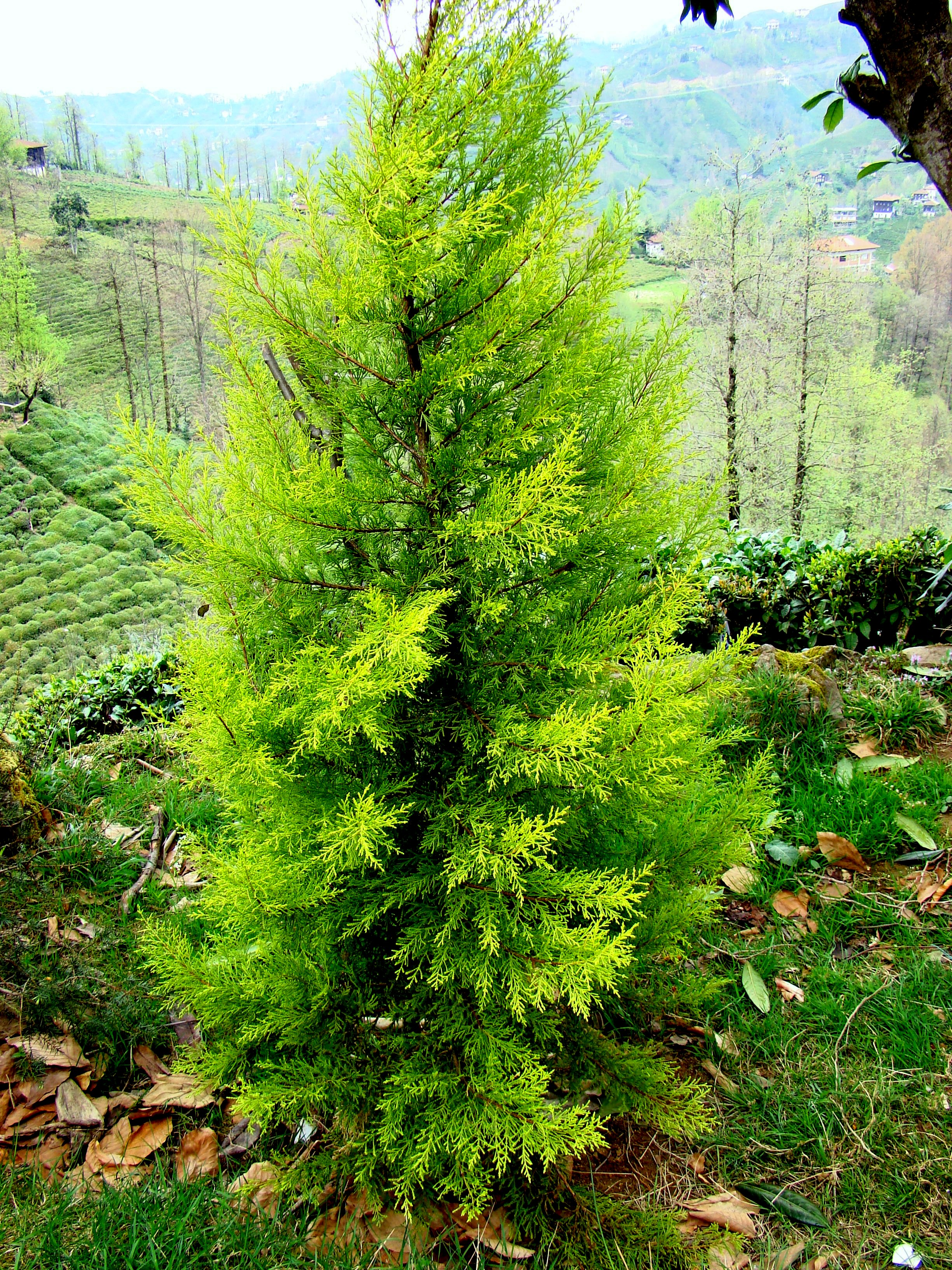 Cupressus macrocarpa 'Goldcrest'